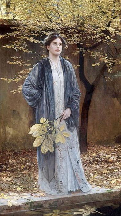 Stiller Winkel (Öl auf Leinwand, 62 × 112 cm) von Max Nonnenbruch, 1909. Versteigerungskatalog 1913, Versteigerungskatalog 1913 (Abbildung).